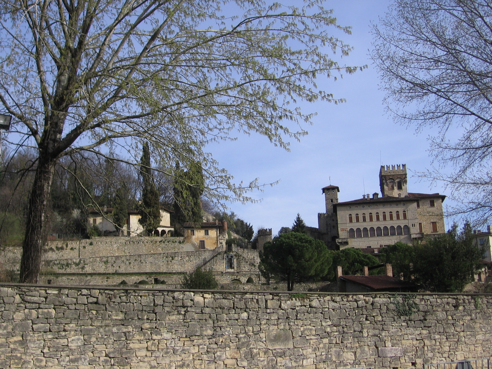 Costa di Mezzate, Bergamo, Italia